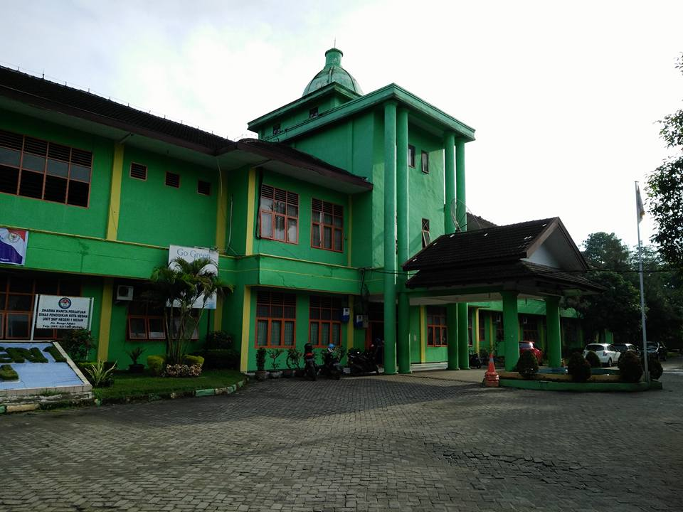 SMP Negeri 1 Medan